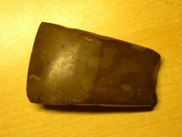 Gevonden op 27 oktober 1999 op een maisakker bij Wapse. Jaap Bijker van het Drents Museum in Assen denkt dat het een bijltje is van de Trechterbekercultuur en dat het dateert van ongeveer 3400 tot 2800 v. Chr. Hij omschrijft het als een gaaf vuurstenen bijltje afkomstig uit Helgoland of Noord-Duitsland. De bruine patina is ontstaan doordat humuszuren eeuwenlang op het bijltje hebben ingewerkt. De oorspronkelijke kleur is grijs. Hij denkt dat het een fragment kan zijn van een grotere bijl. Het bijltje zou een keer zijn afgebroken. De top is opnieuw bijgewerkt. Op het bijltje zijn duidelijke gebruikssporen te zien.